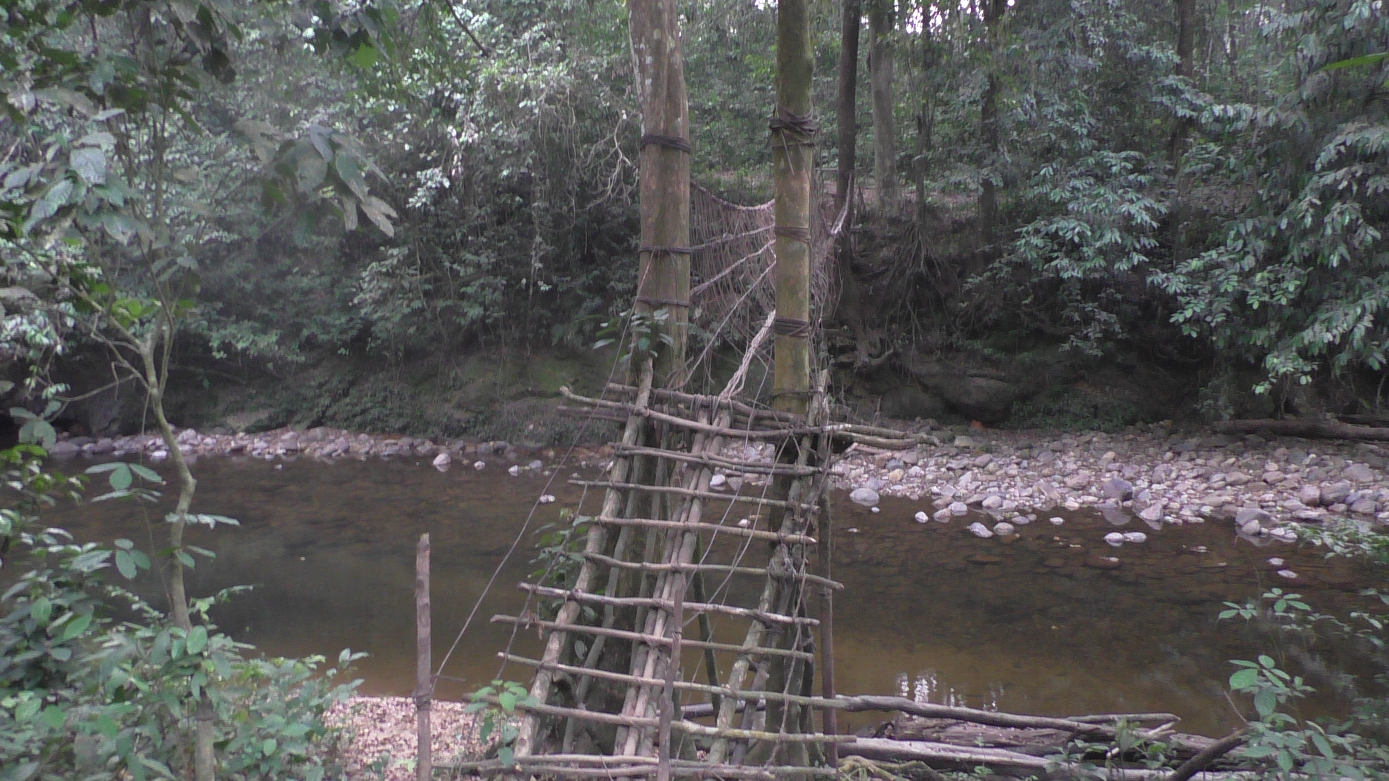 Sanctuaire de Bayang Mbo